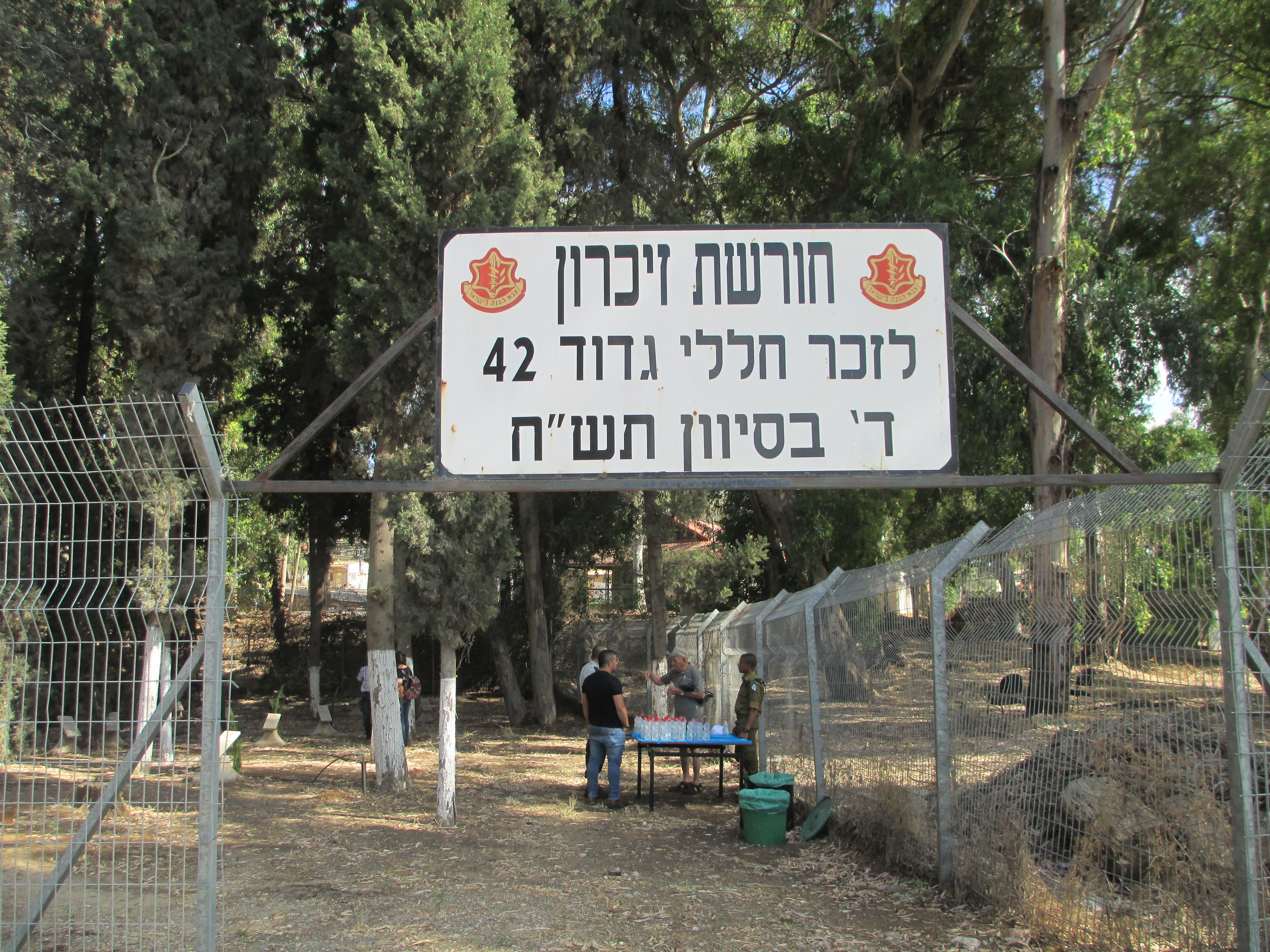 חורשת זיכרון לגדוד 42 בצריפין